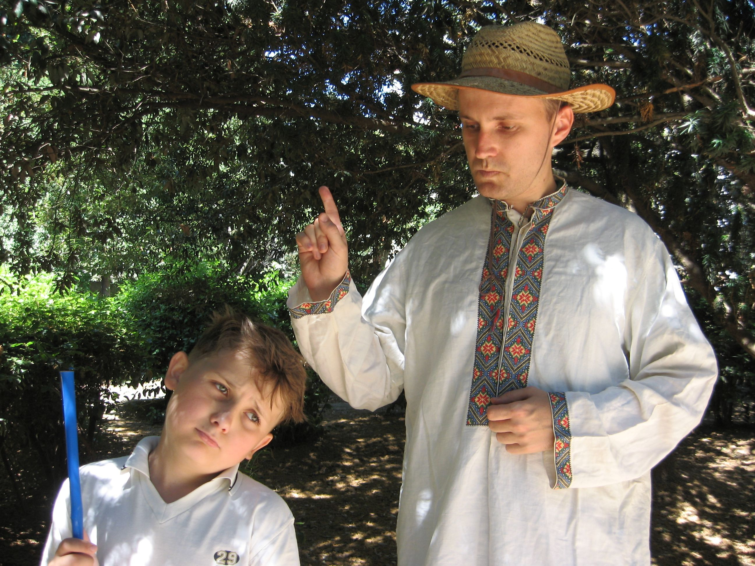 Teatraĵo "Knabaĉo" (Злой мальчик, laŭvorte "kolera knabeto") de Anton Ĉeĥov en esperantlingva prezento, montrata en Jalto dum la SAT-Kongreso en 2012 kun aktorado de Gurij Korniljev kaj knaba aktoro Konstantin